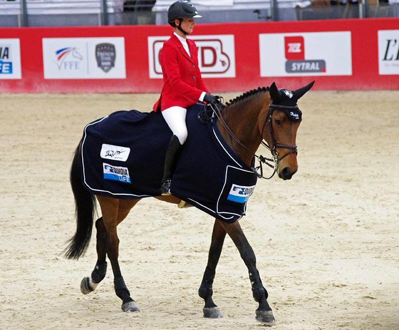 Pénélope Leprévost et Nayana, lors des Masters d'Equita Lyon (2ème de l'épreuve).